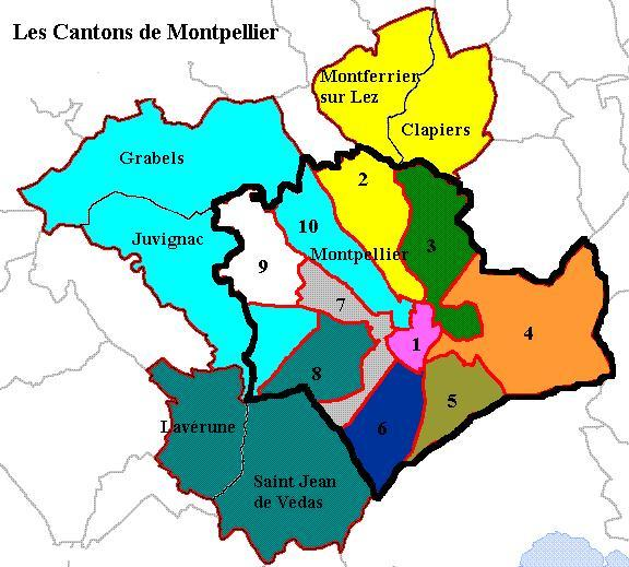 Le découpage des cantons de Montpellier de 1992 à 2015. Image personnelle